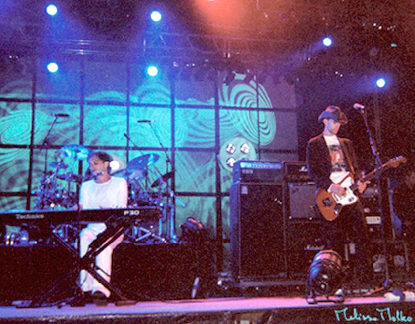 Placebo no Festival Sudoeste, Agosto 2001